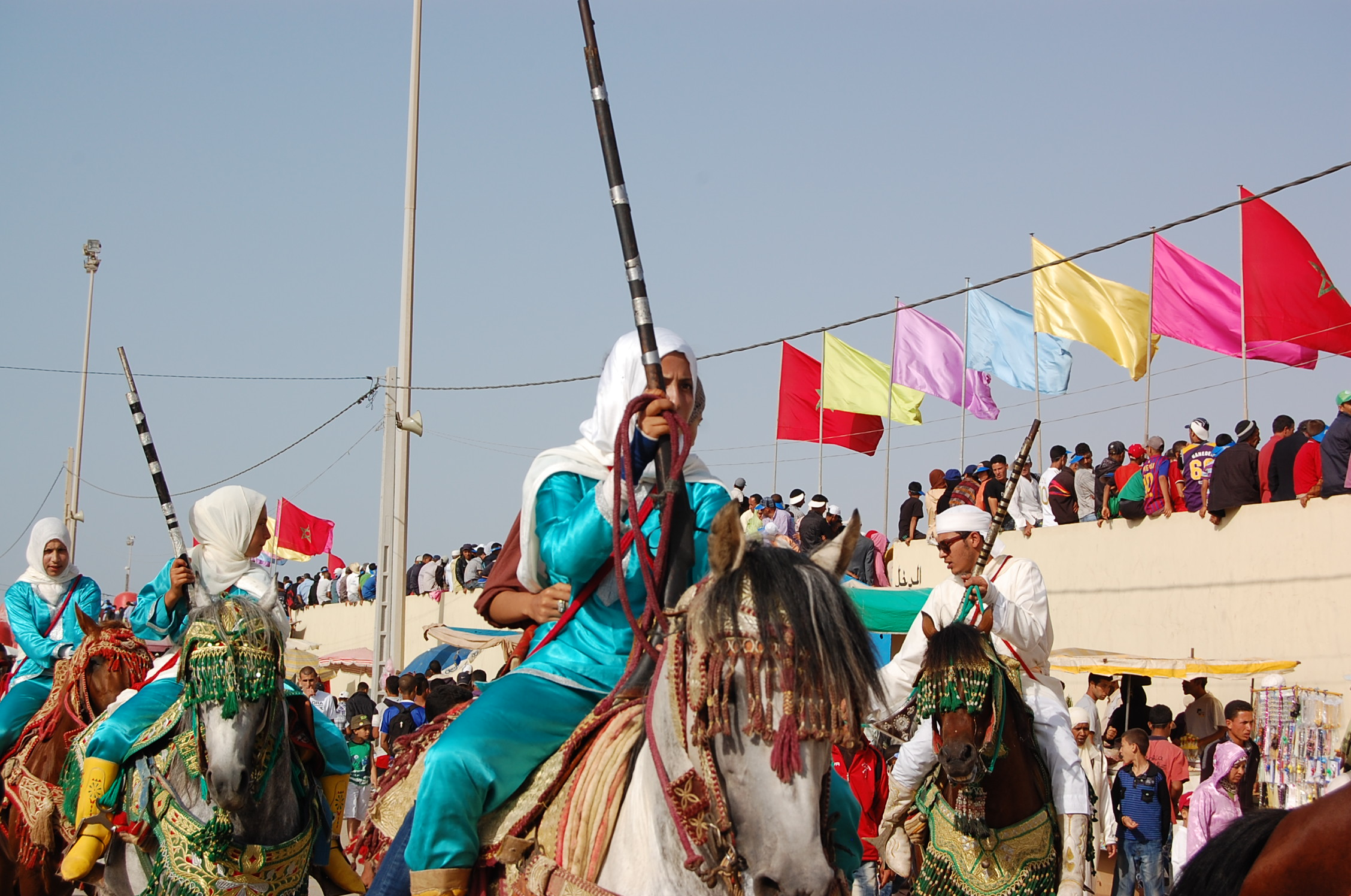 Walon: Fantazia Moulay Abdellah : trope di comeres